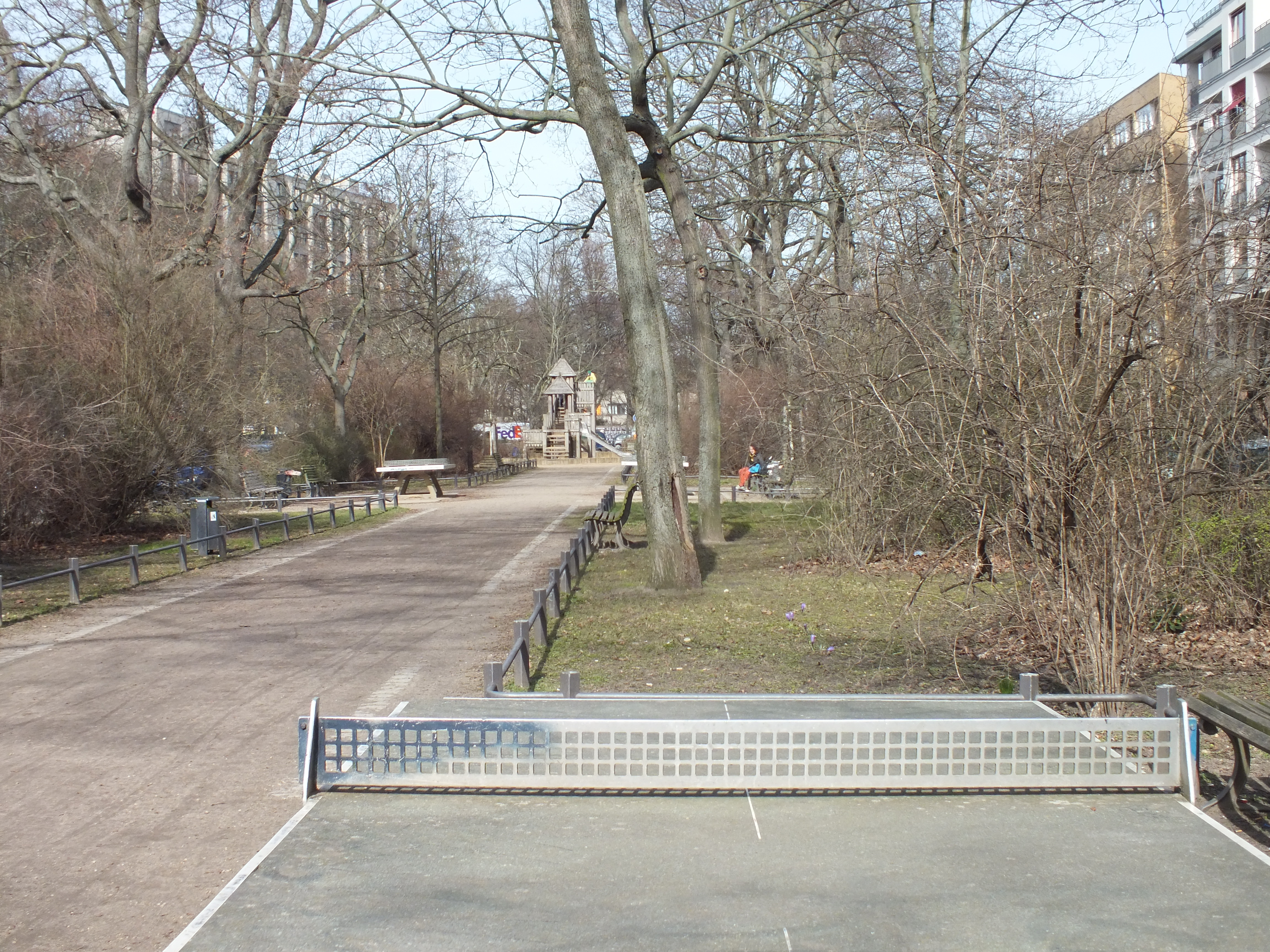 Fontanepromenade in Kreuzberg: Grünstreifen in Straßenmitte